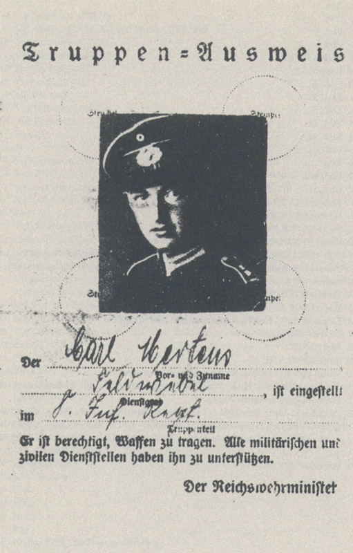 Truppenausweis von Carl Mertens. Eigener Scan.